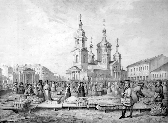 Вид на Сенную площадь в 1840-х годах. Из альбома планов для построения чугунных мостов на реке Мойке. Акварель. РГВИА